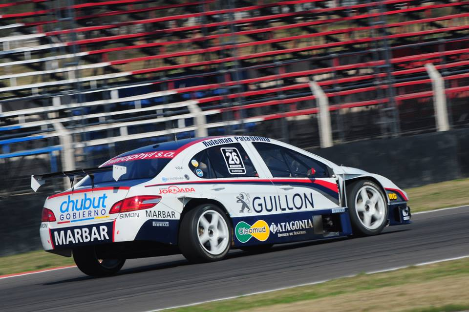 Farroni y su Peugeot 408